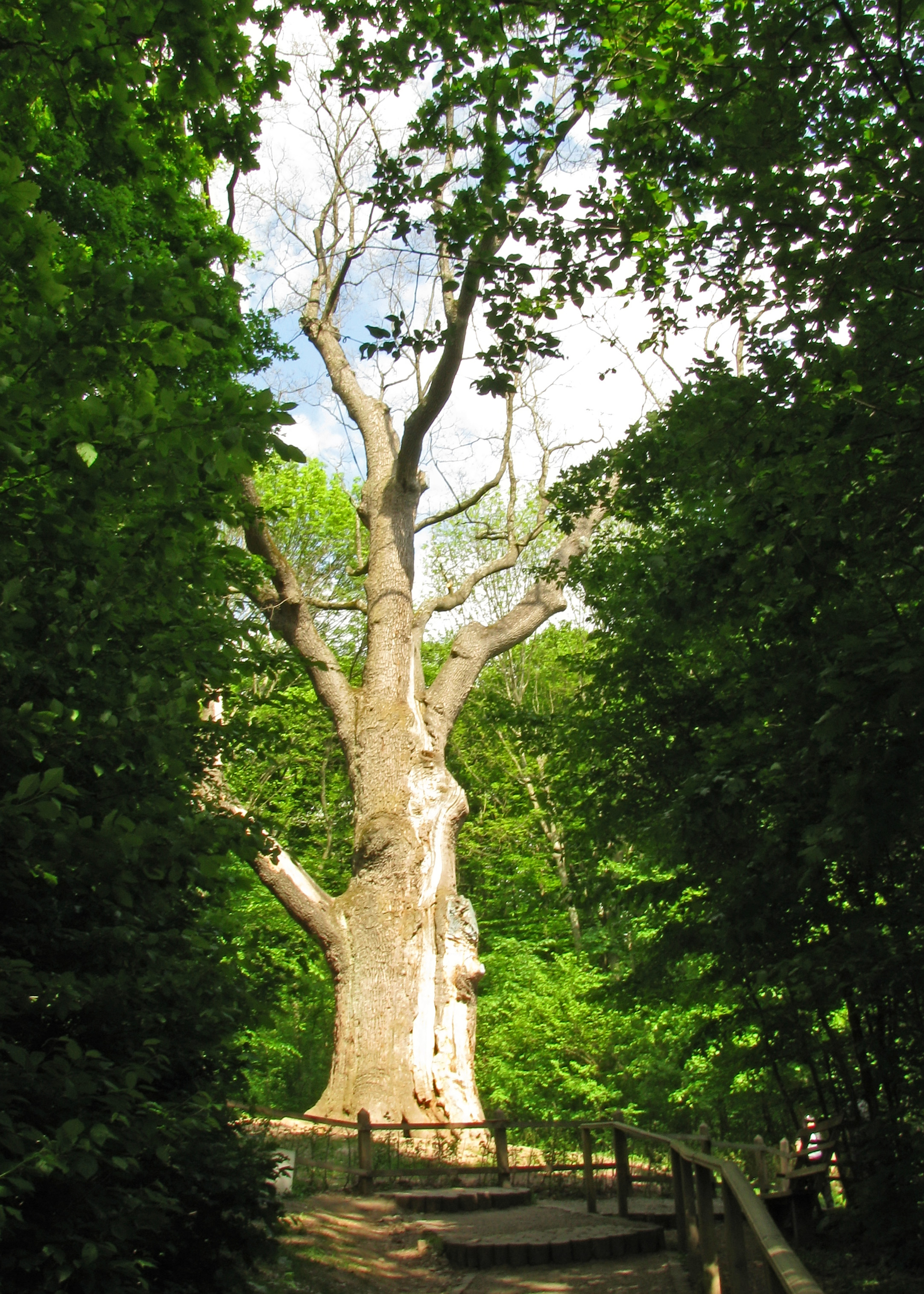 Урочище «Дуб Максима Залізняка», Чигирин, хутір Буда